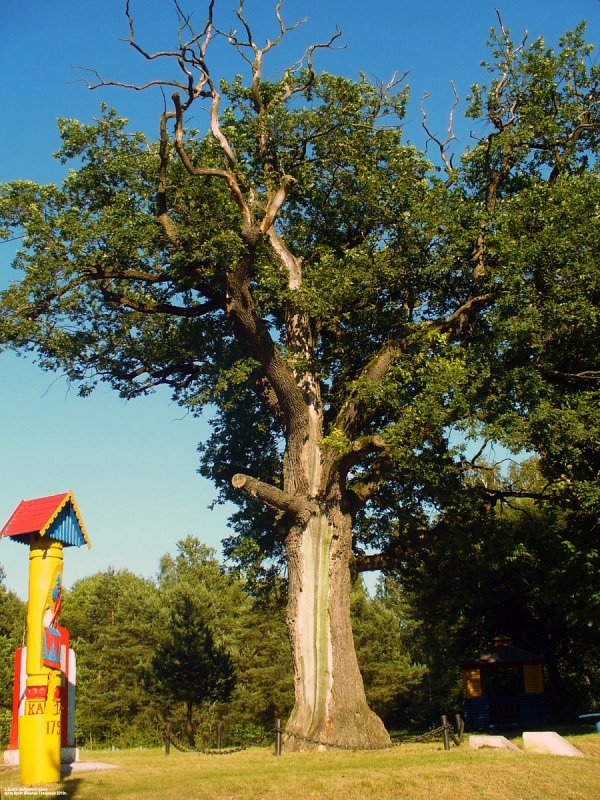 Дзівін. Дуб Суворава